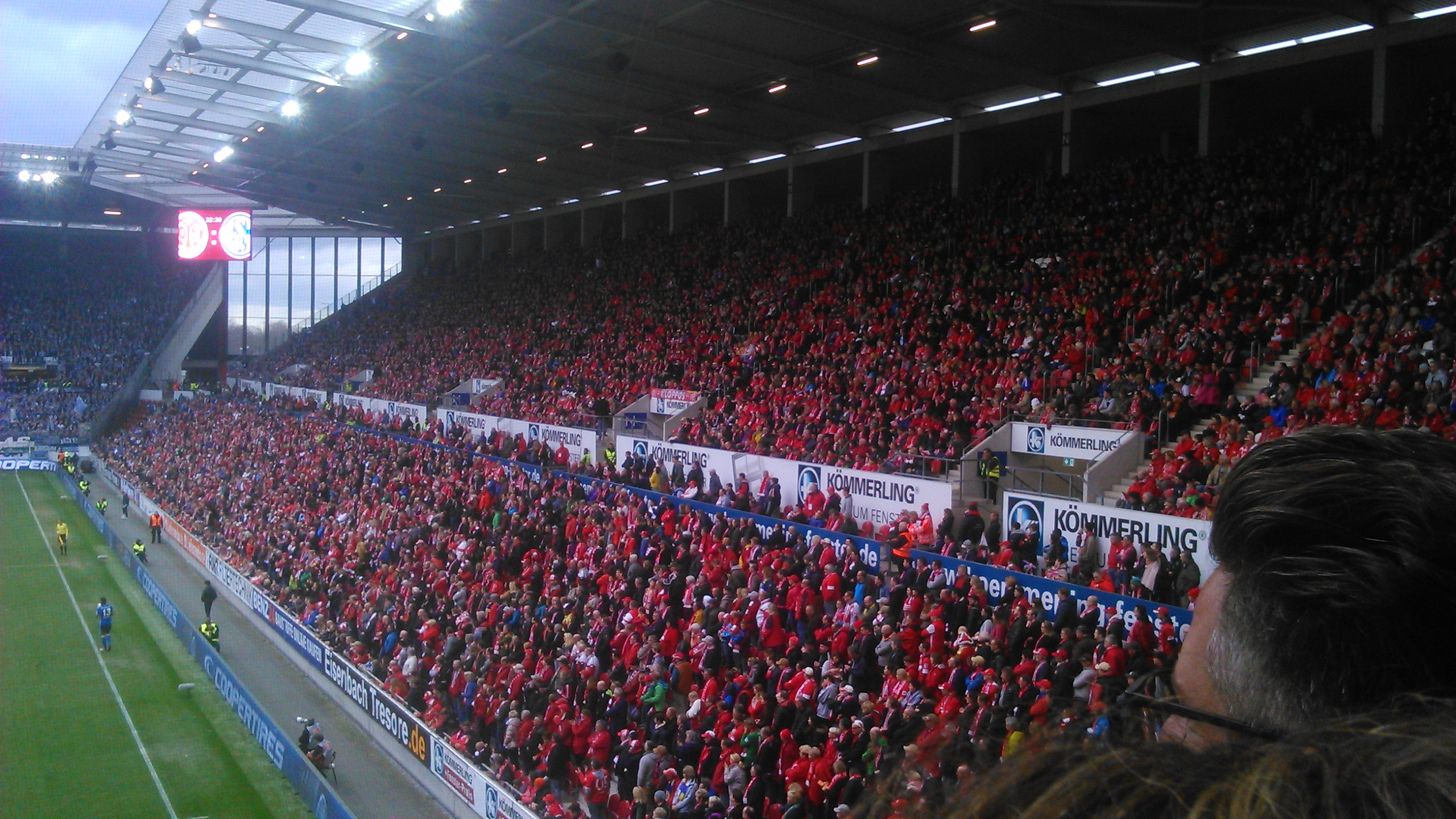 Blick in die Südtribüne der Opel Arena beim Spiel Mainz 05 gegen Schalke 04 am 19. März 2017